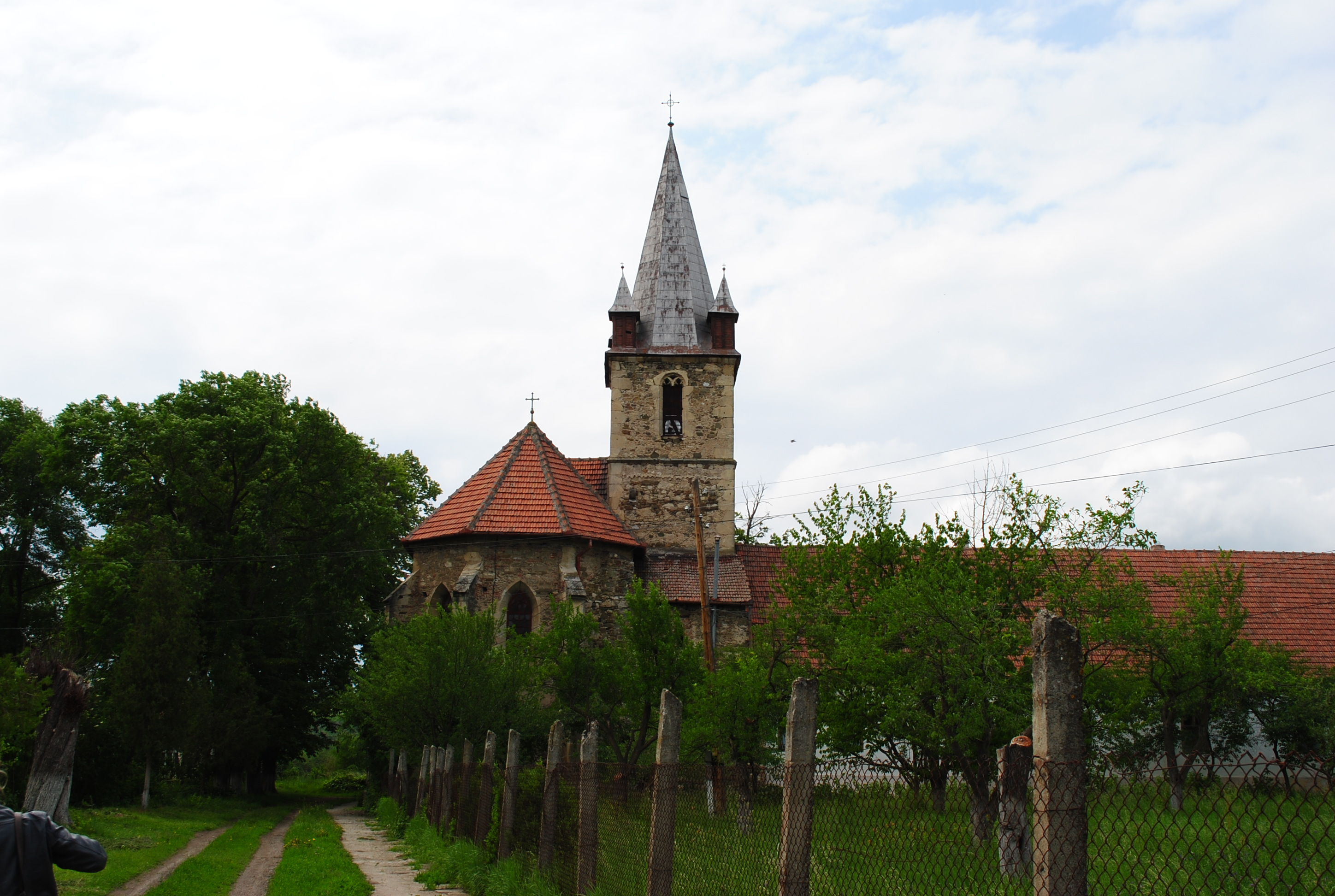 Teiuș, Mănăstirea romano-catolică, sec. XV - XVIII